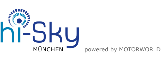 Logo von Hi-Sky